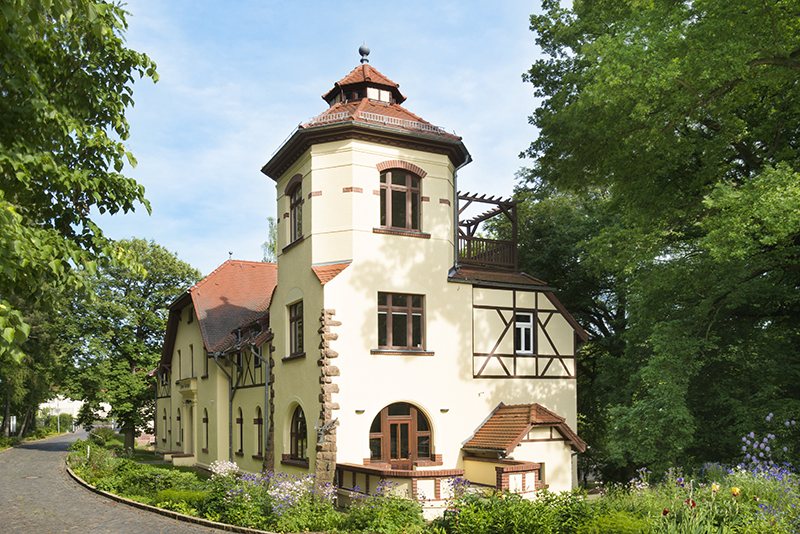 Haus Energie, 2014, Copyright: Gerda und Klaus Tschira Stiftung